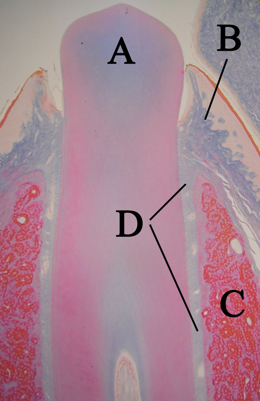 Corte histológico de urupción dental en la boca. A: Diente B: Encía C: Hueso D: Ligamentos del periodonto Histologic slide of an erupting tooth with tooth (labeled A), gingiva (labeled B), alveolar bone (labeled C), and periodontal ligaments (labeled D). Source: Photo taken by user:dozenist.